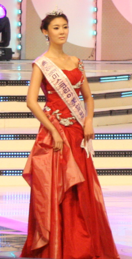 2009 미스코리아 당선자들